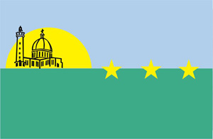 Diseño: Solangel Gomez Camacho, Rectángulo dividido horizontalmente en partes iguales anexándole semicírculo en ángulo inferior izquierdo de su primera franja superior incluyéndole iconos de nuestra ciudad y estrellas en la unión de ambos rectángulos.